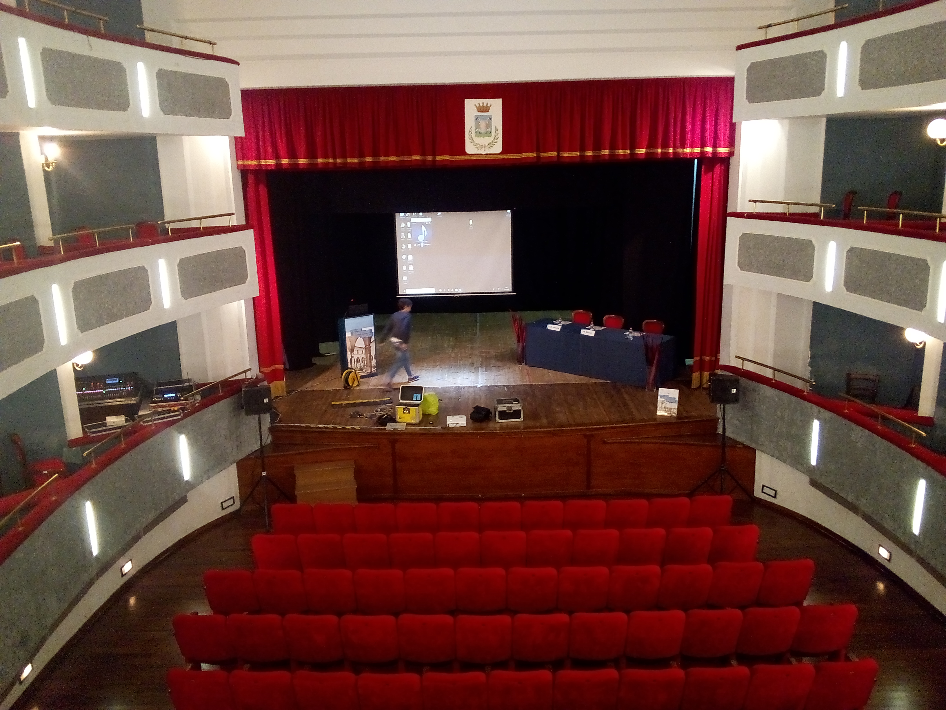 Interno del teatro